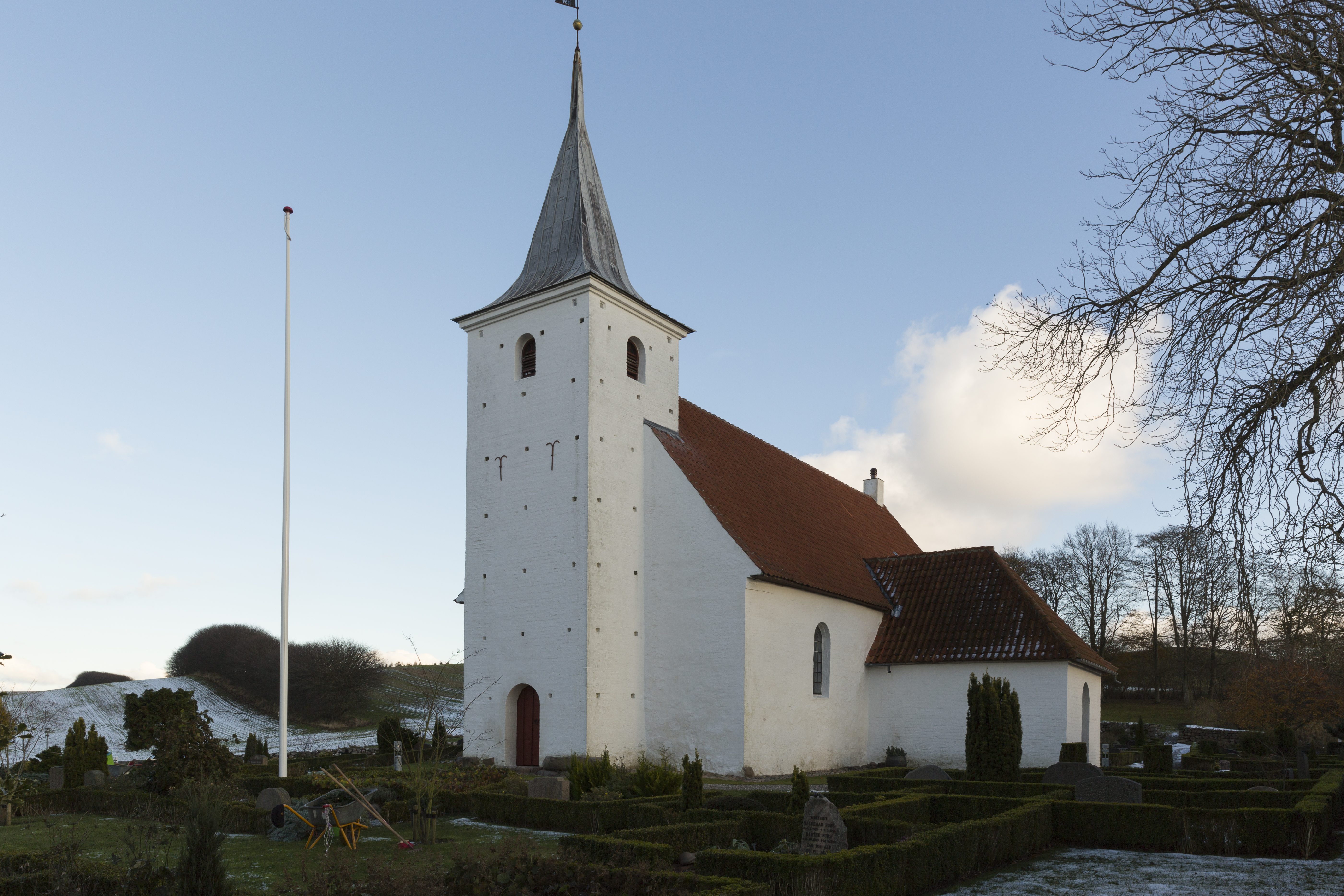 Agri Kirke